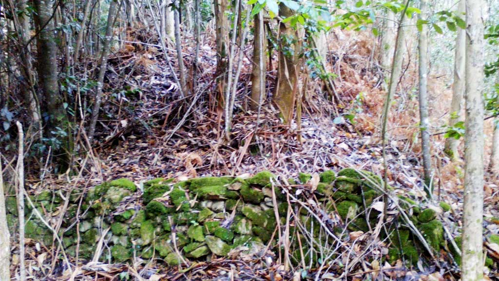 Castro da Croa de Fontá, Ferrol.